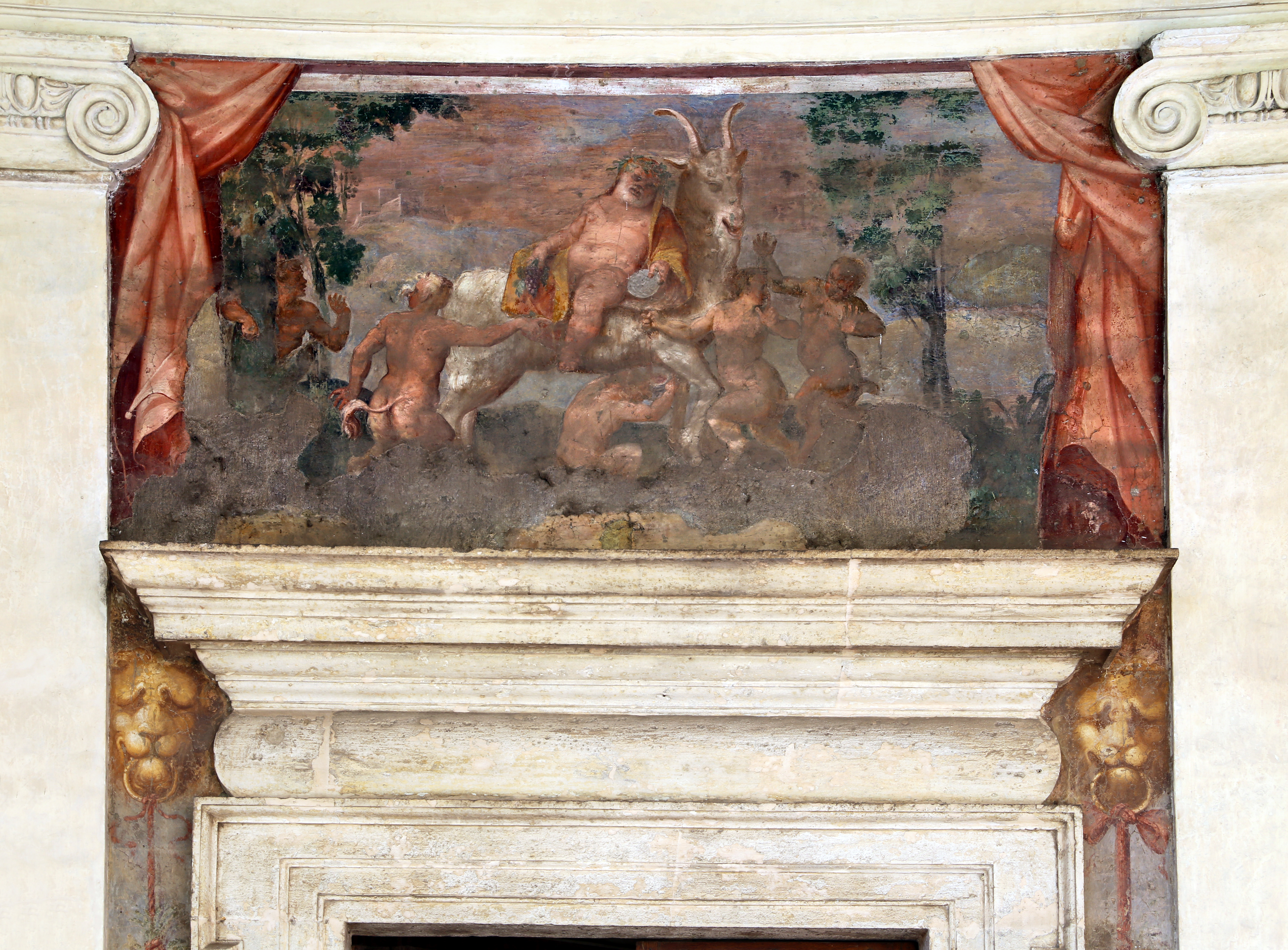 Villa Giulia (Rome) This is a photo of a monument which is part of cultural heritage of Italy.